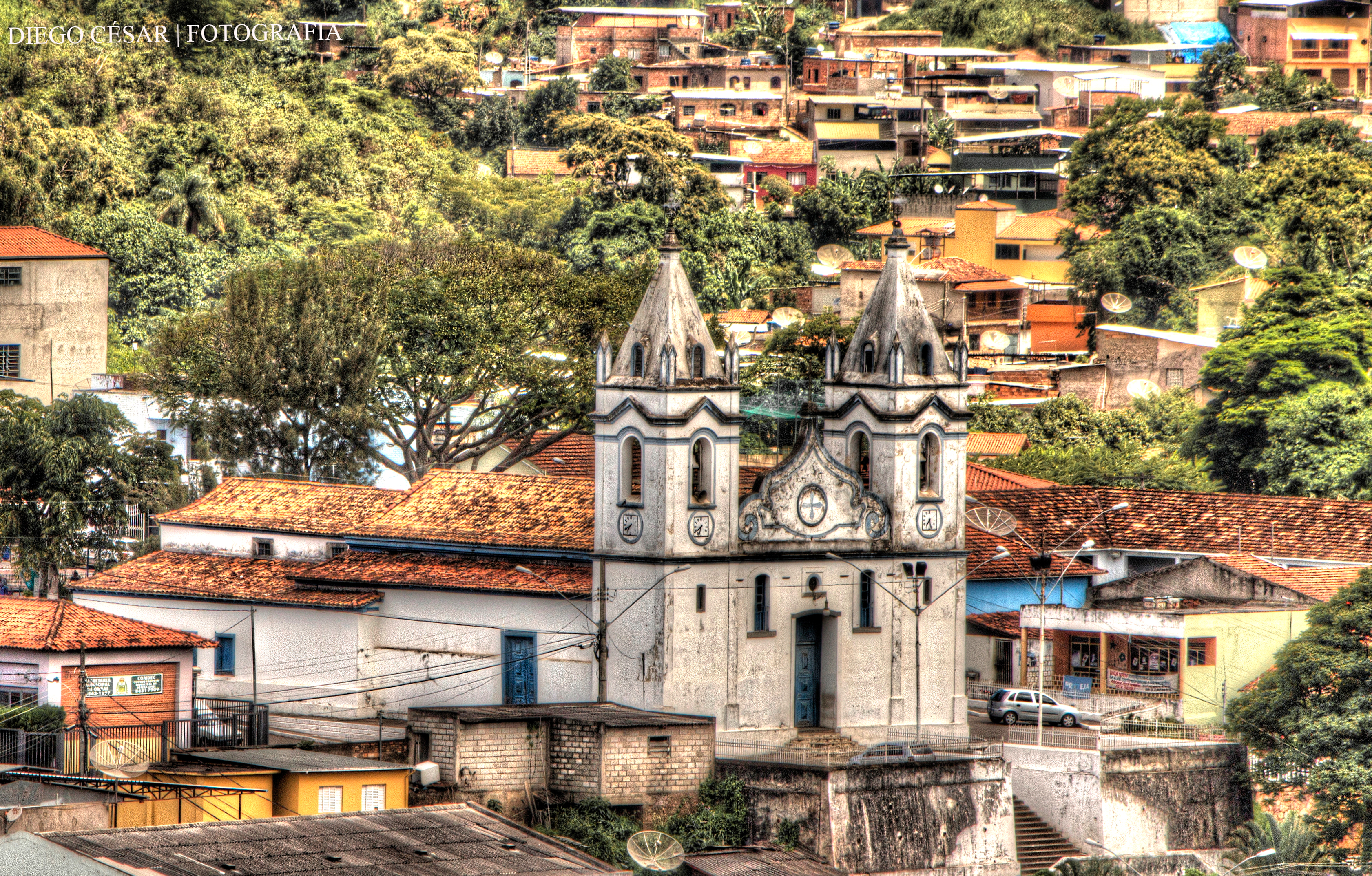 Igreja de Nossa Senhora da Conceição